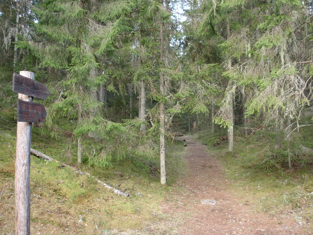 Kimera oru jalgrada